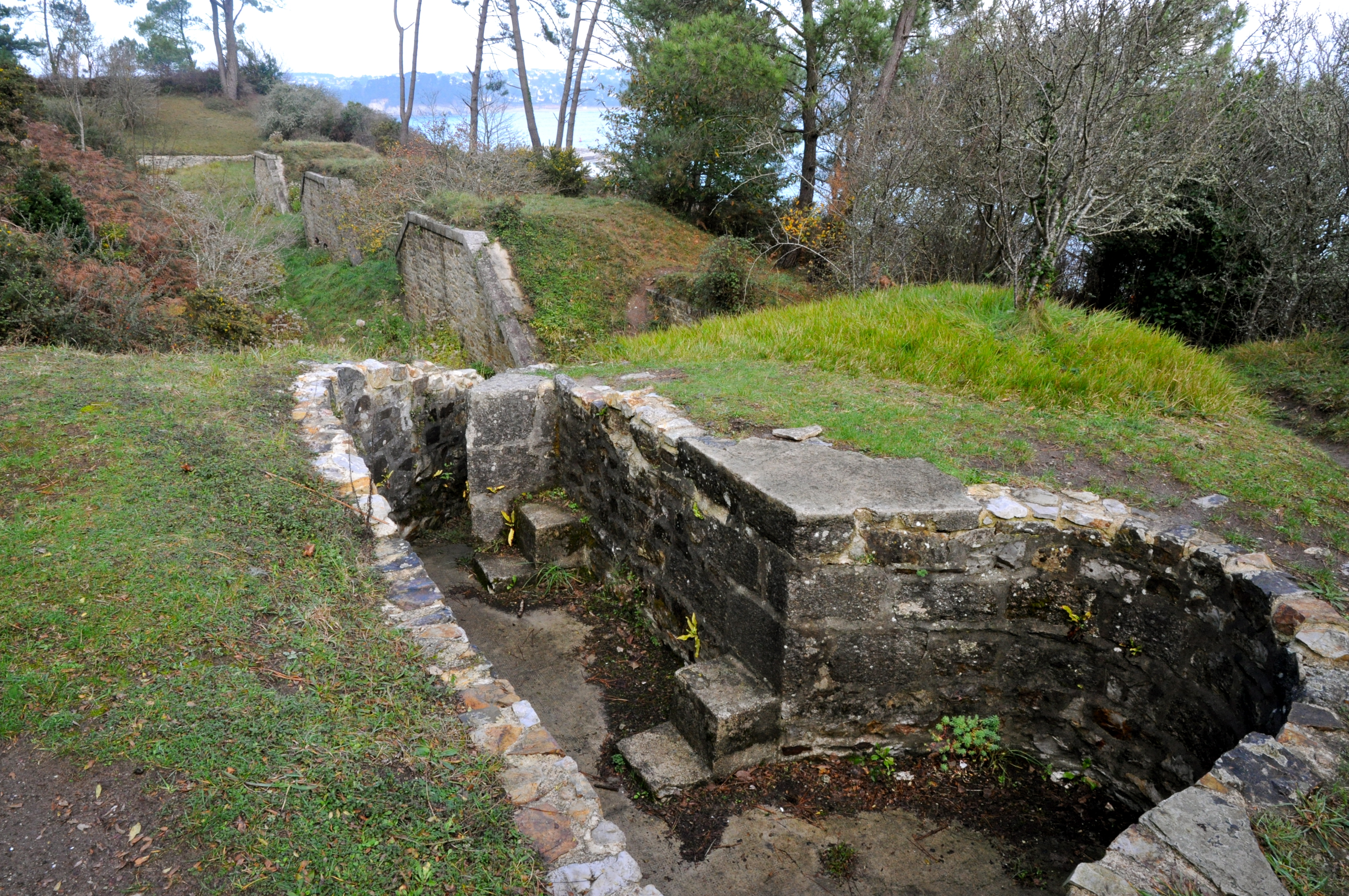 Batterie basse de la pointe du Kador au dessus de Morgat en CROZON